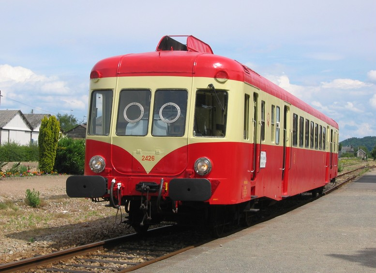 X2426 en Gare de Pont-Audemer